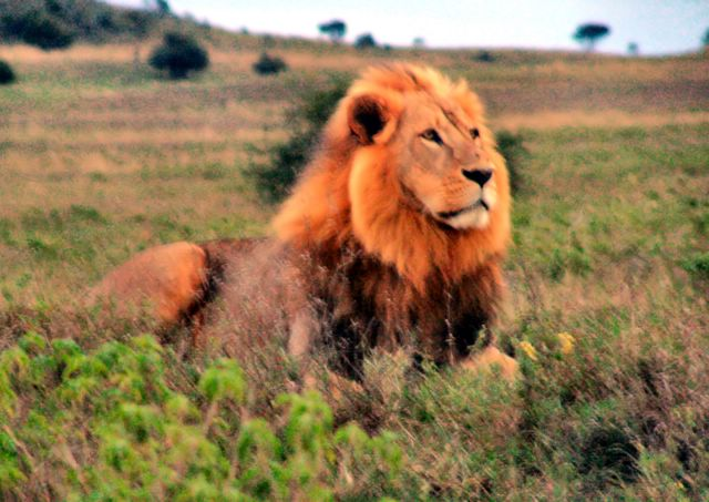 Lion in Kenya.